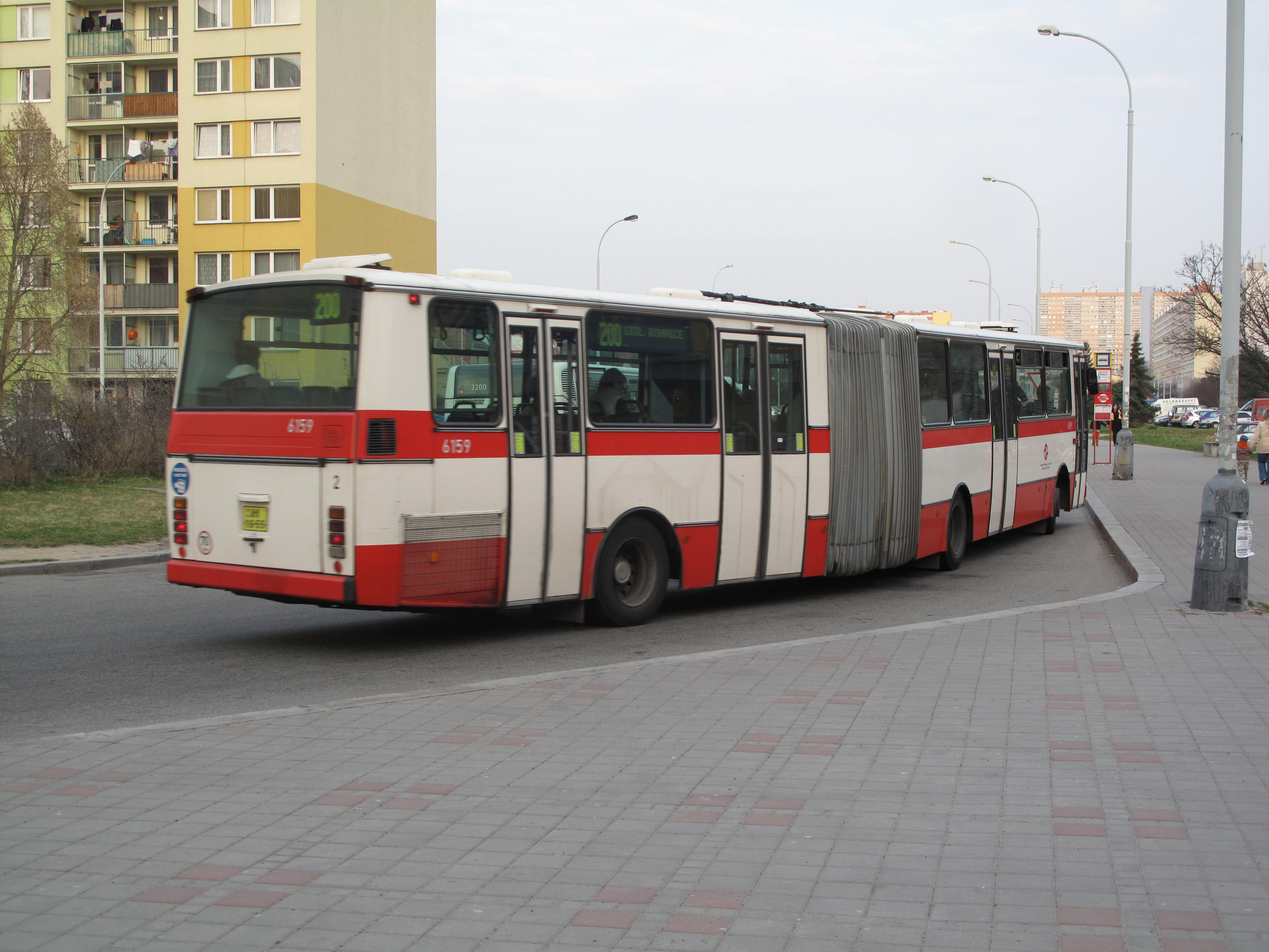 Konečná Sídliště Bohnice